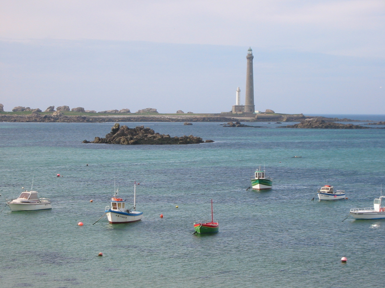 Vue sur le phare de l'Ile vierge. Ce phare est situé dans le Finistère. La prise de vue a été réalisée sur la plage de Saint Cava près de Plougerneau.